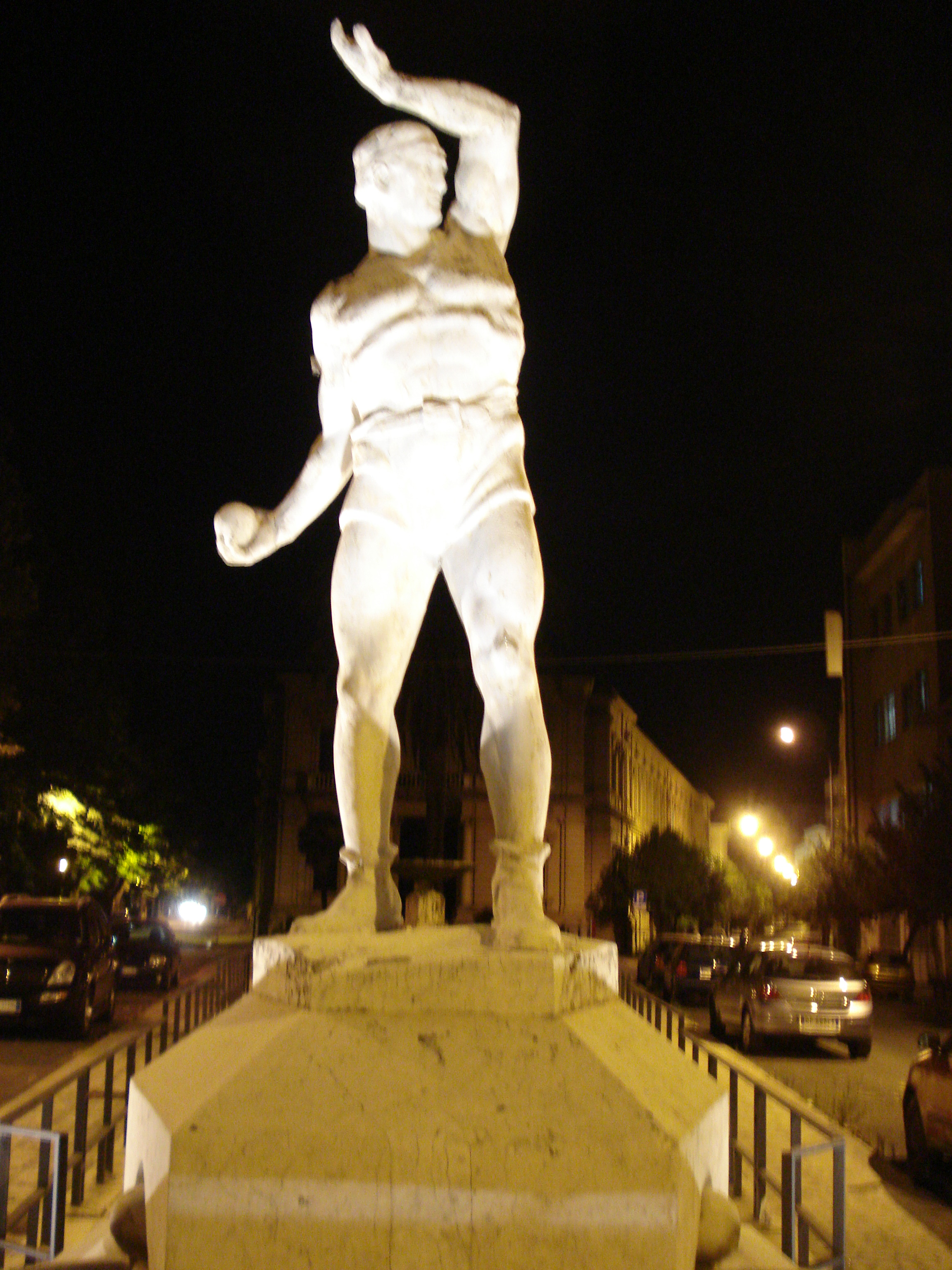 FONTANA DEL BALILLA DELL'EPOCA DEL FASCISMO NEL CENTRO DI COSENZA